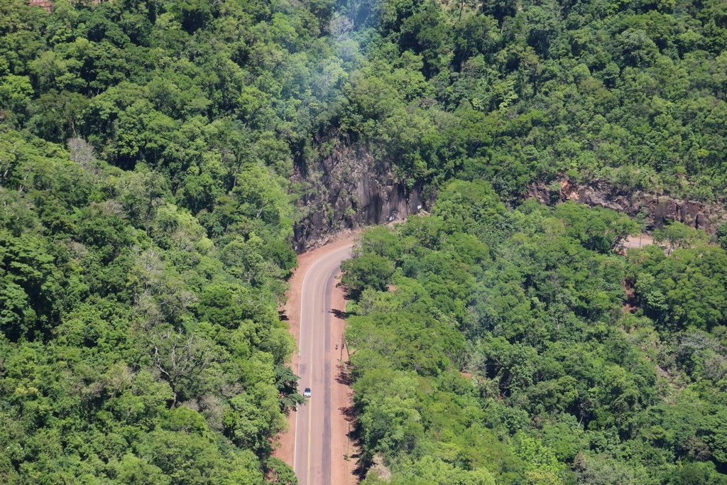 Ruta Provincial 7 en la provincia de Misiones, Argentina.